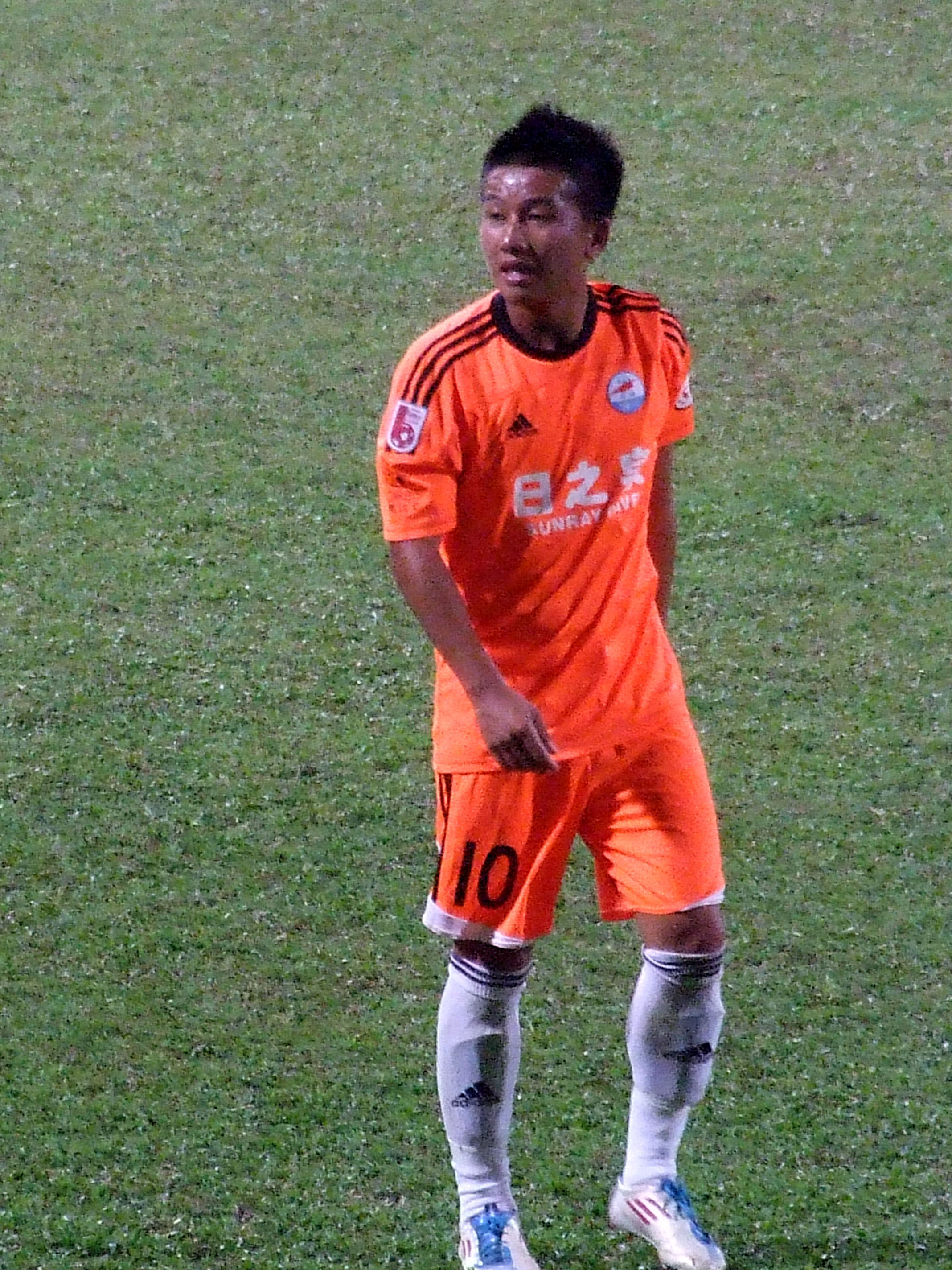 中文（香港）: 陸志豪 - 大埔 VS 晨曦